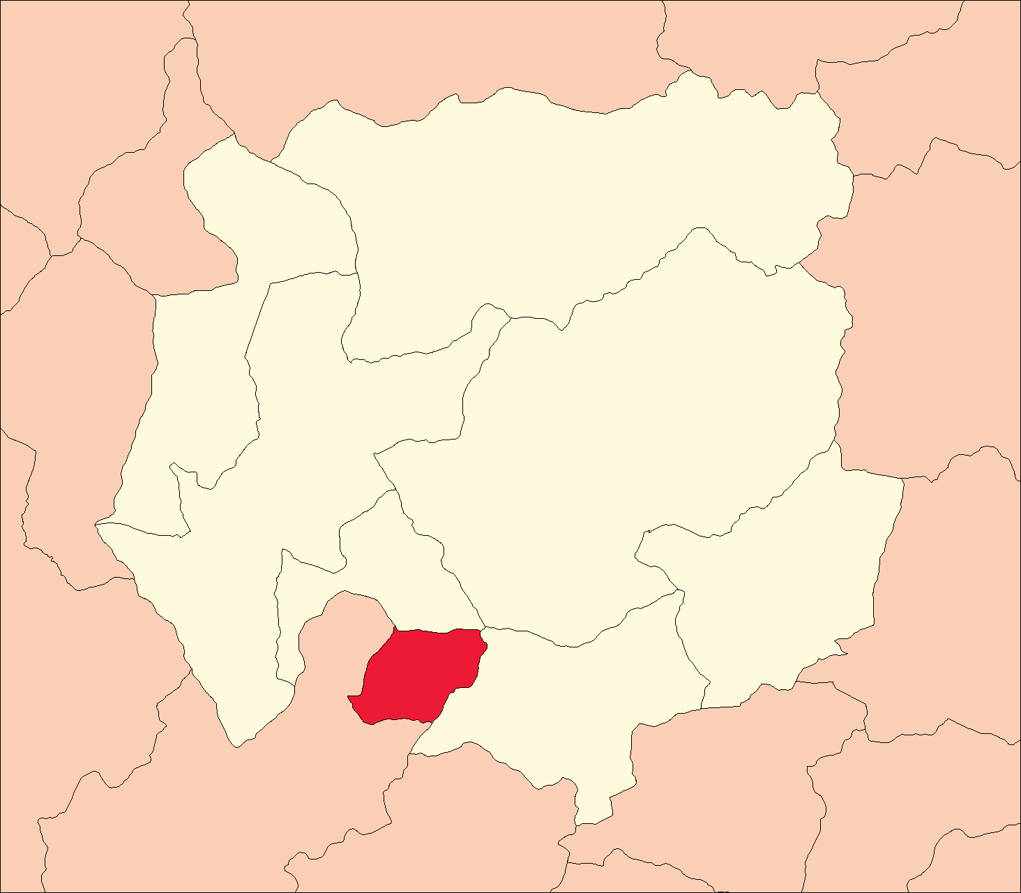 Ubicación del distrito de Chacabamba.